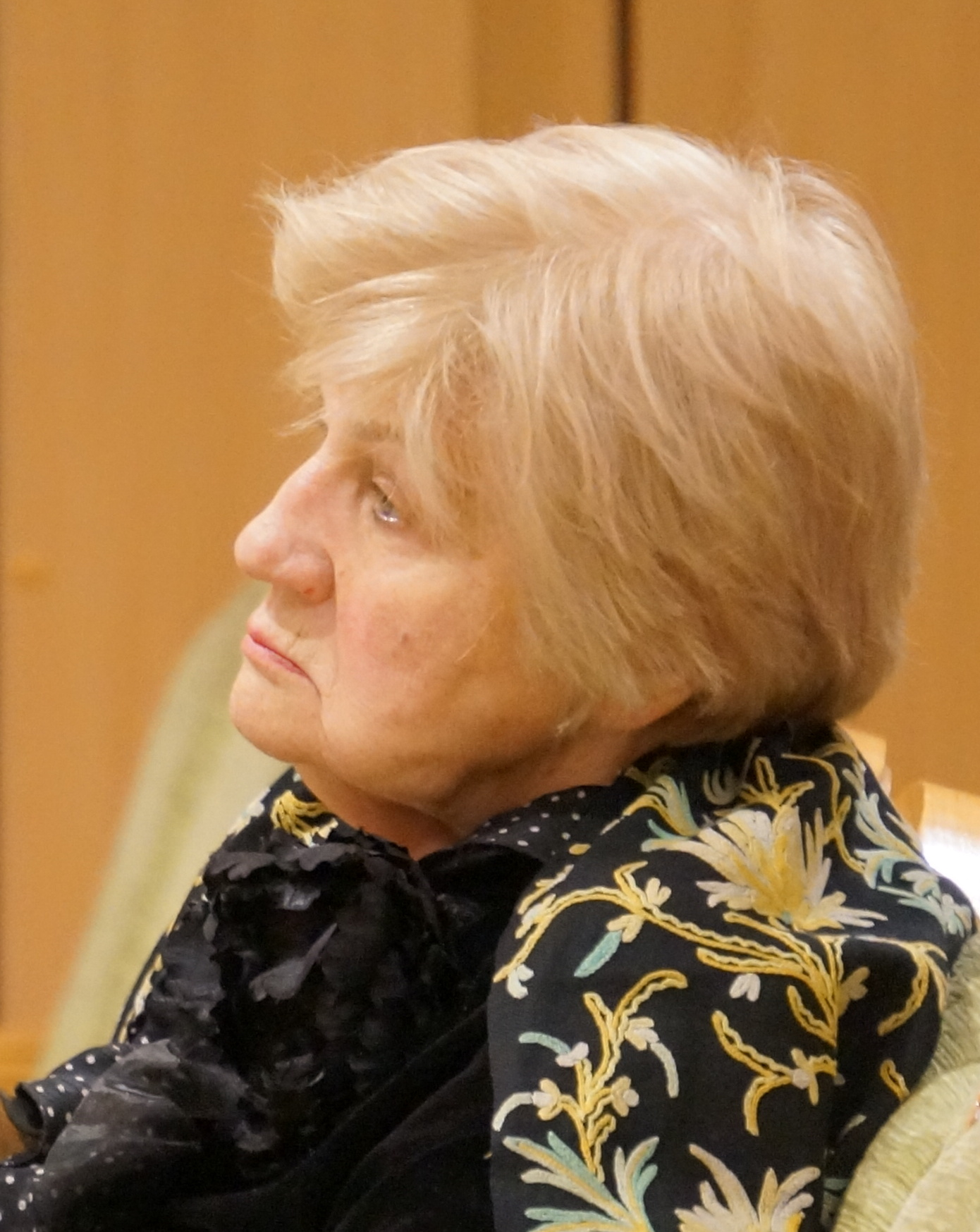 Татьяна Борисовна Батыгина, XIII съезд Русского ботанического общества. Тольятти, 2013 год.